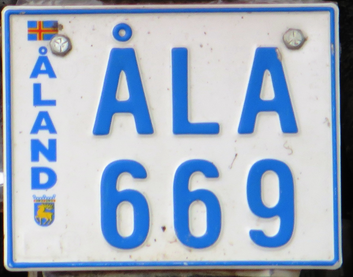 Åland motorfiets kentekenplaat